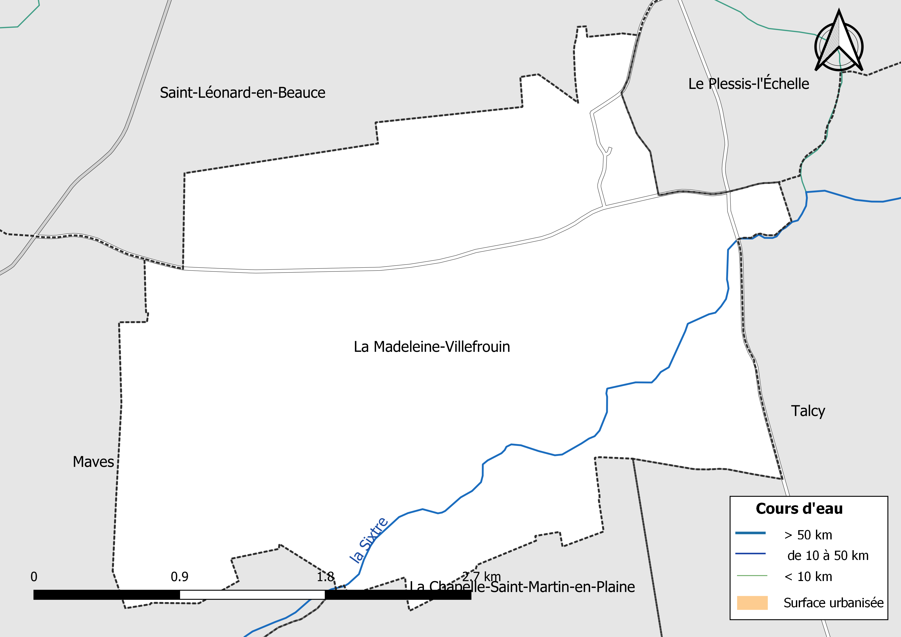 Carte du réseau hydrographique de la commune de La Madeleine-Villefrouin (Loir-et-Cher, France).